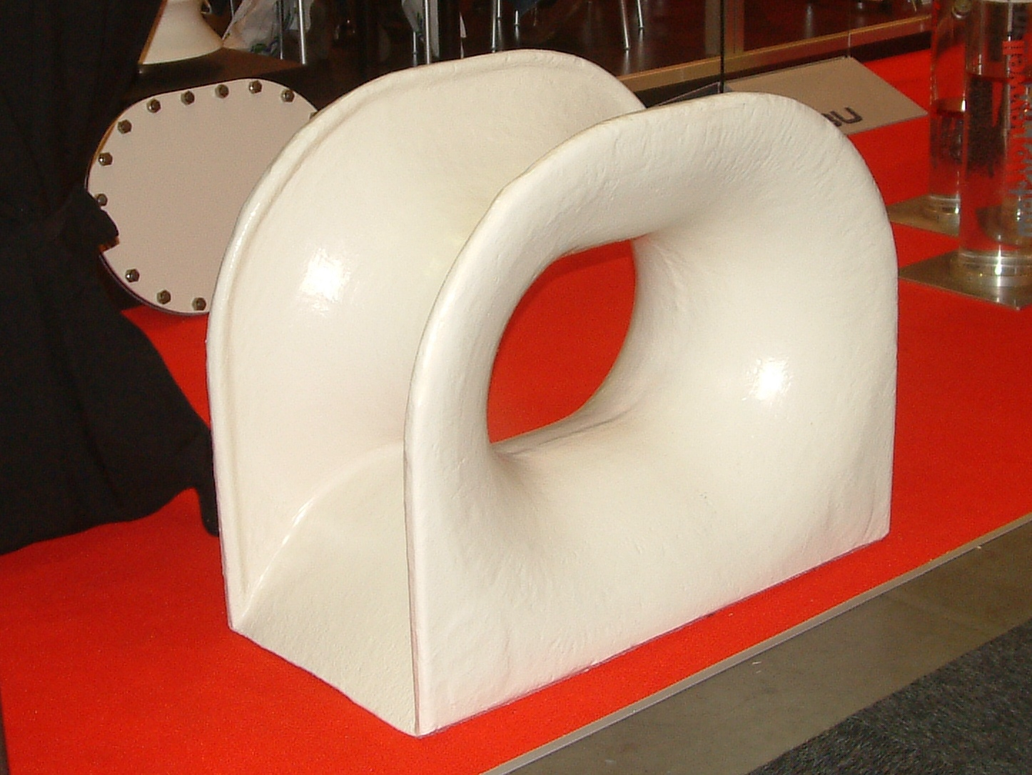 Europort 2009